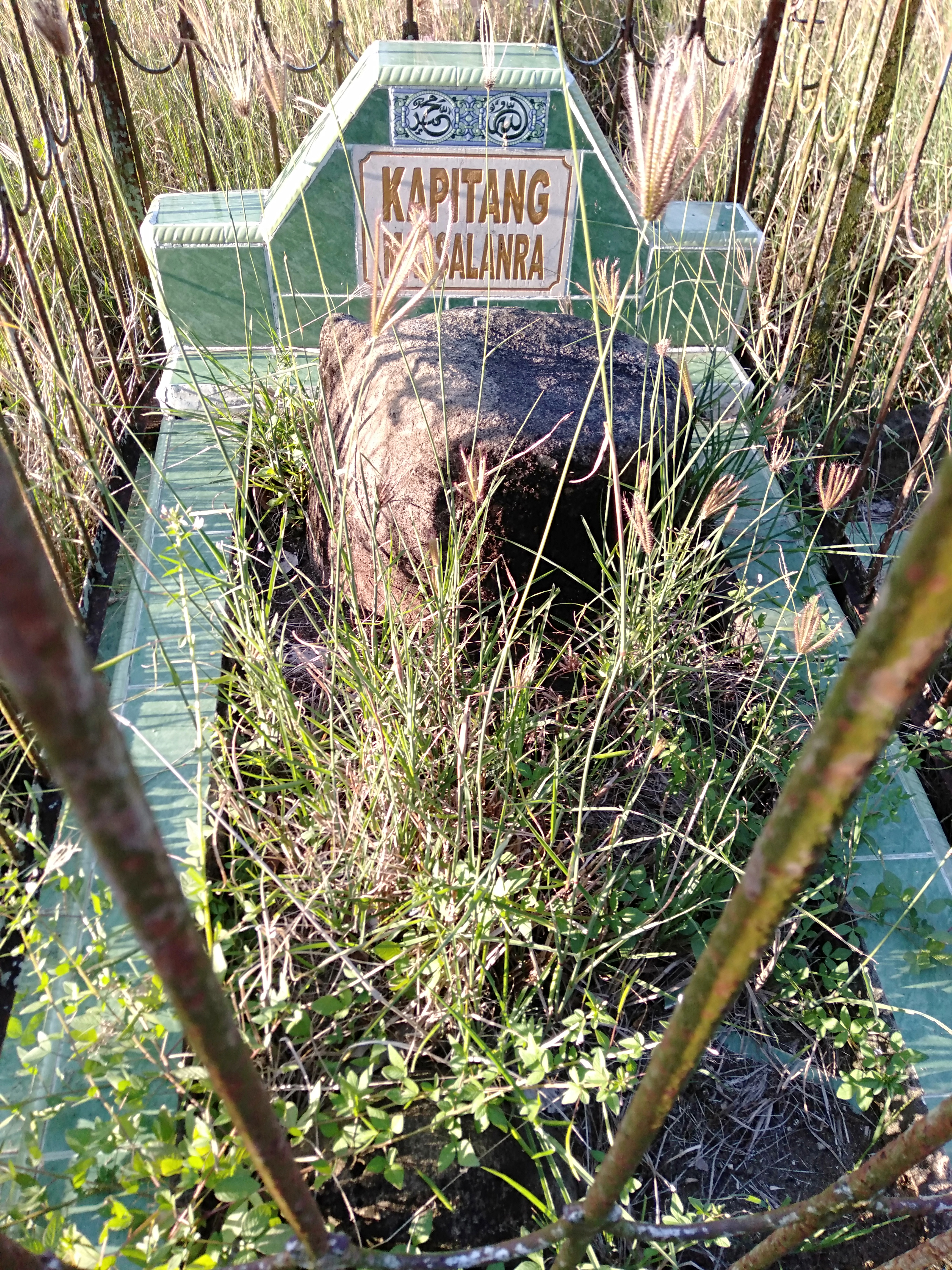 Kapitan massalanra